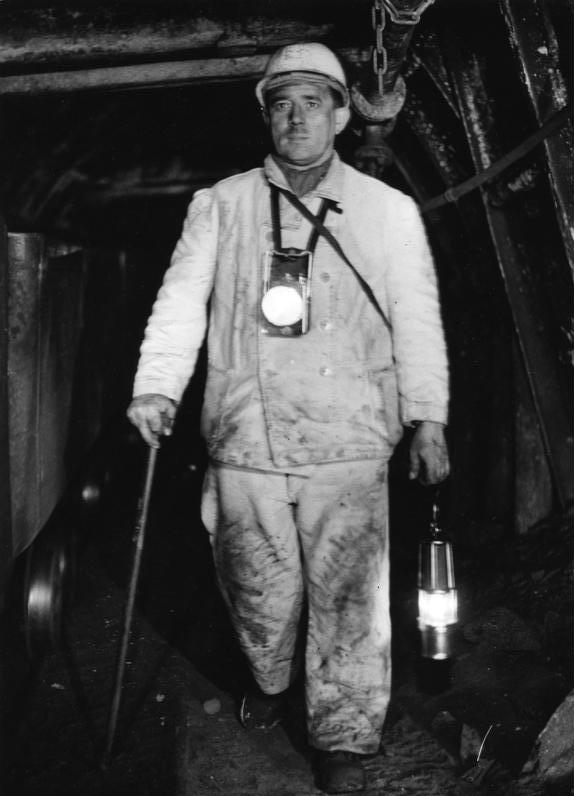 Ruhrbergbau-Essen Der Steiger auf seinem Weg zum Kohlenstreb